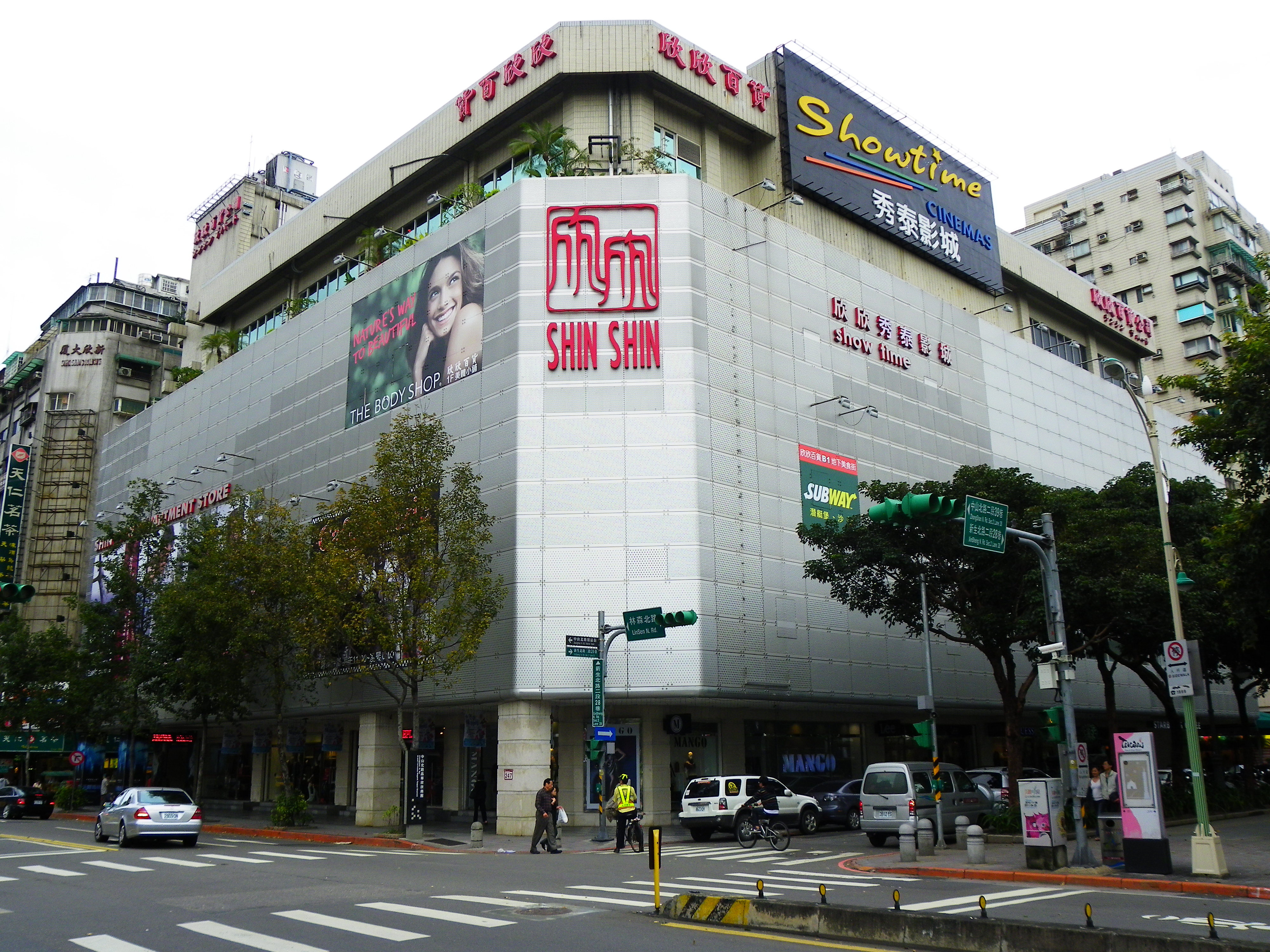 臺北市欣欣大眾百貨公司與欣欣秀泰影城。